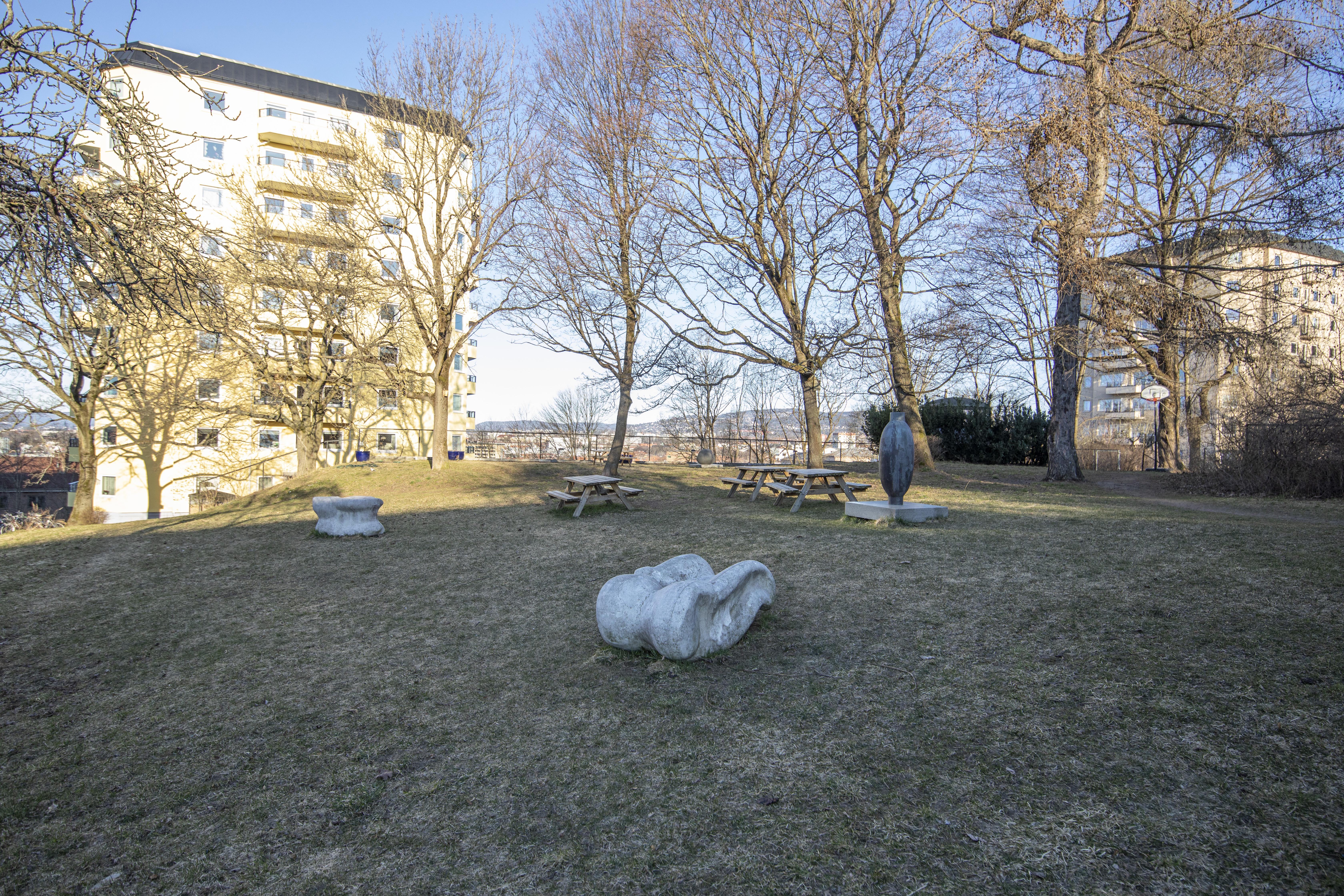 Norsk Billedhoggerforening sin skuplturpark utenfor Villa Furulund i Hekkveien i Oslo.